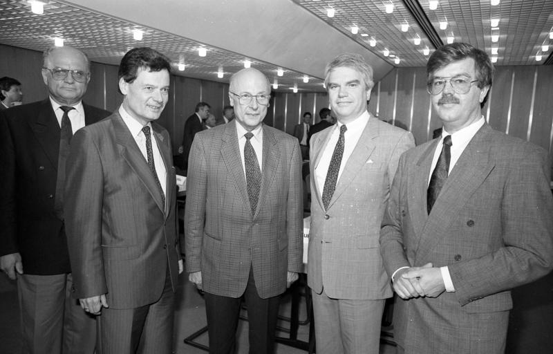 Bonn, 16.7.1991 Unter Vorsitz des Staatssekretärs beim Bundesminister des Innern, Franz Kroppenstedt, tagte im Bundesinnenministerium erstmals der von der Bundesregierung eingesetzte Arbeitsstab zur Vorbereitung und Planung des Umzuges von Bonn nach Berlin. An dem Gespräch nahmen Vertreter der Bundesländer Berlin, Brandenburg, Nordrhein-Westfalen, Rheinland-Pfalz, der Stadt Bonn und der Landkreise Ahrweiler, Neuwied, Rhein-Sieg, des Bundestages und des Bundesrates teil.